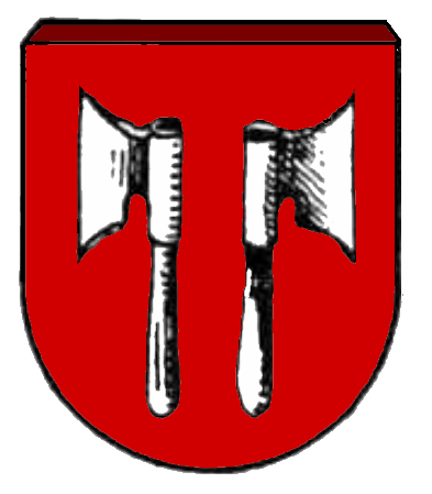 Wappen vpn Hilgertshausen in der Gemeinde Hilgertshausen-Tandern. Coat of arms of the Town Hilgertshausen-Tandern